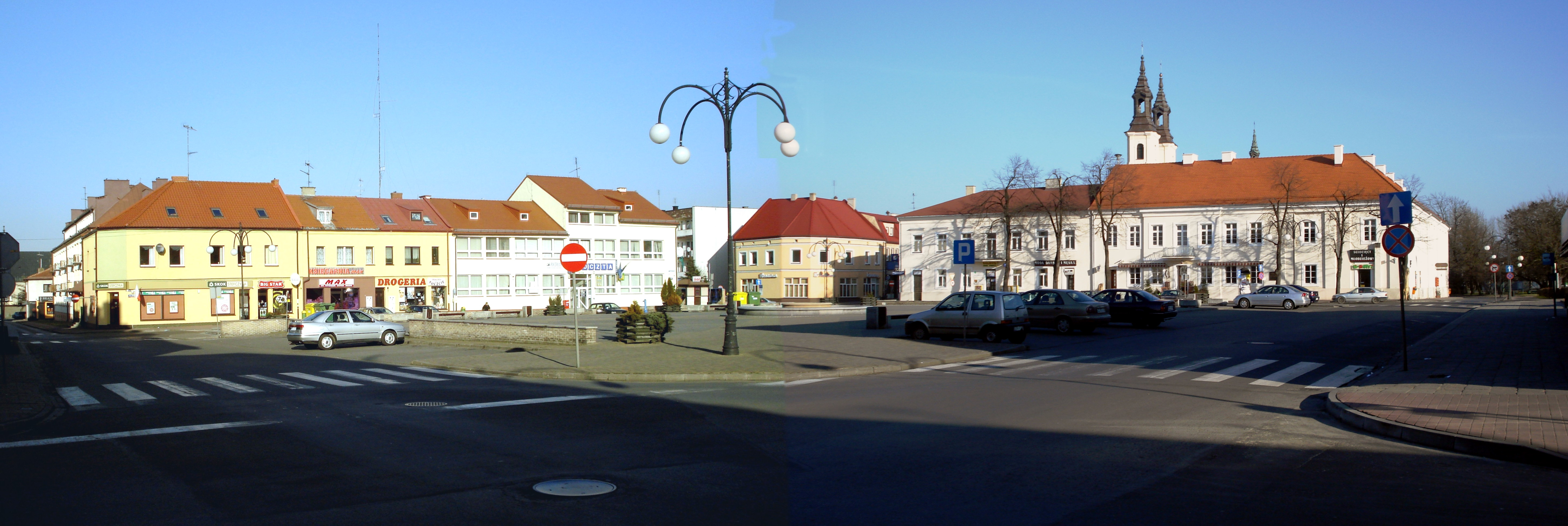 Pl. Legionów (od prawej: stara poczta, poczta, drogeria, księgarnia Max, Big Star, Skok Stefczyka)